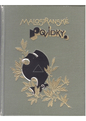 Kleinseitner Geschichten von Jan Neruda; tschechische Ausgabe Prag 1902